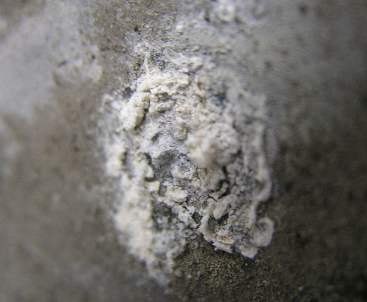 Corrosion par piqûre d'un alliage d'aluminium de la famille des 7000 (gros plan)